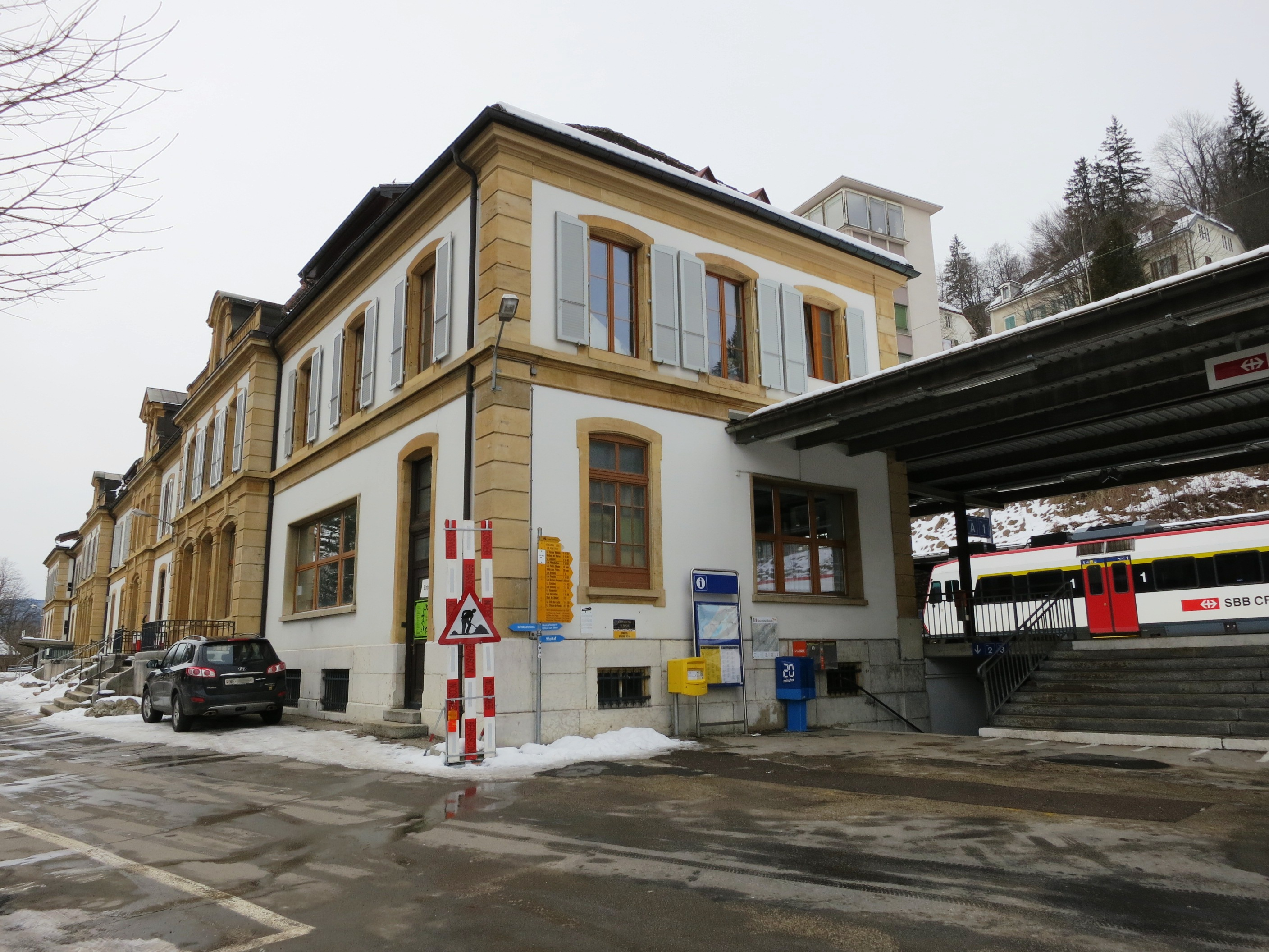 Bahnhof, Le Locle, Schweiz